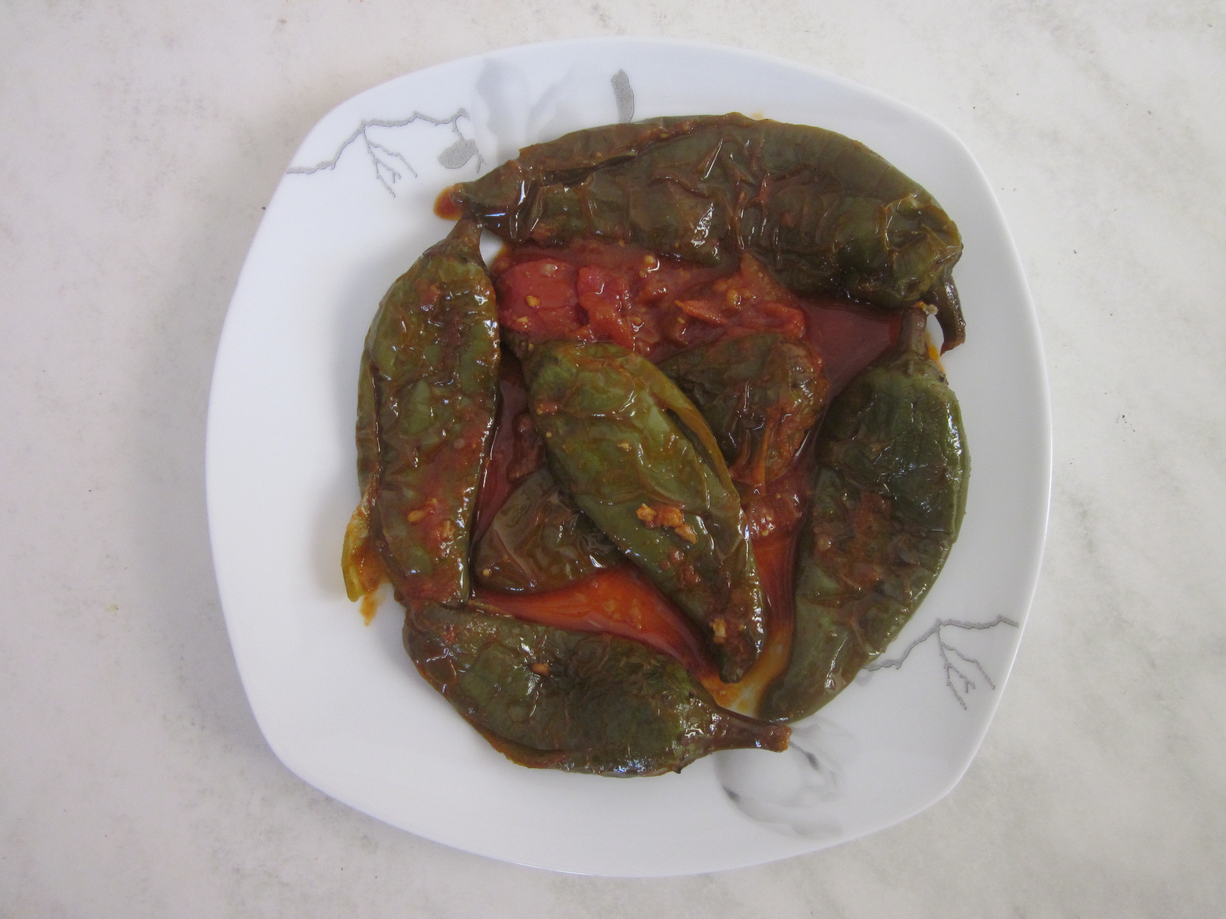 تقلية تحضر لطبخ المرقة الصفاقسية